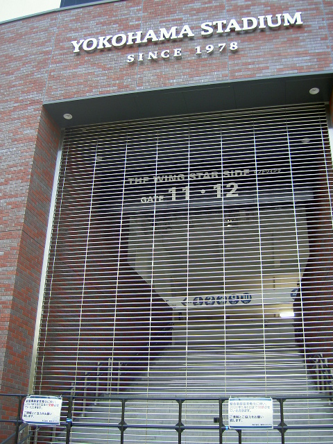 新型コロナウイルスで閉鎖中の横浜スタジアム